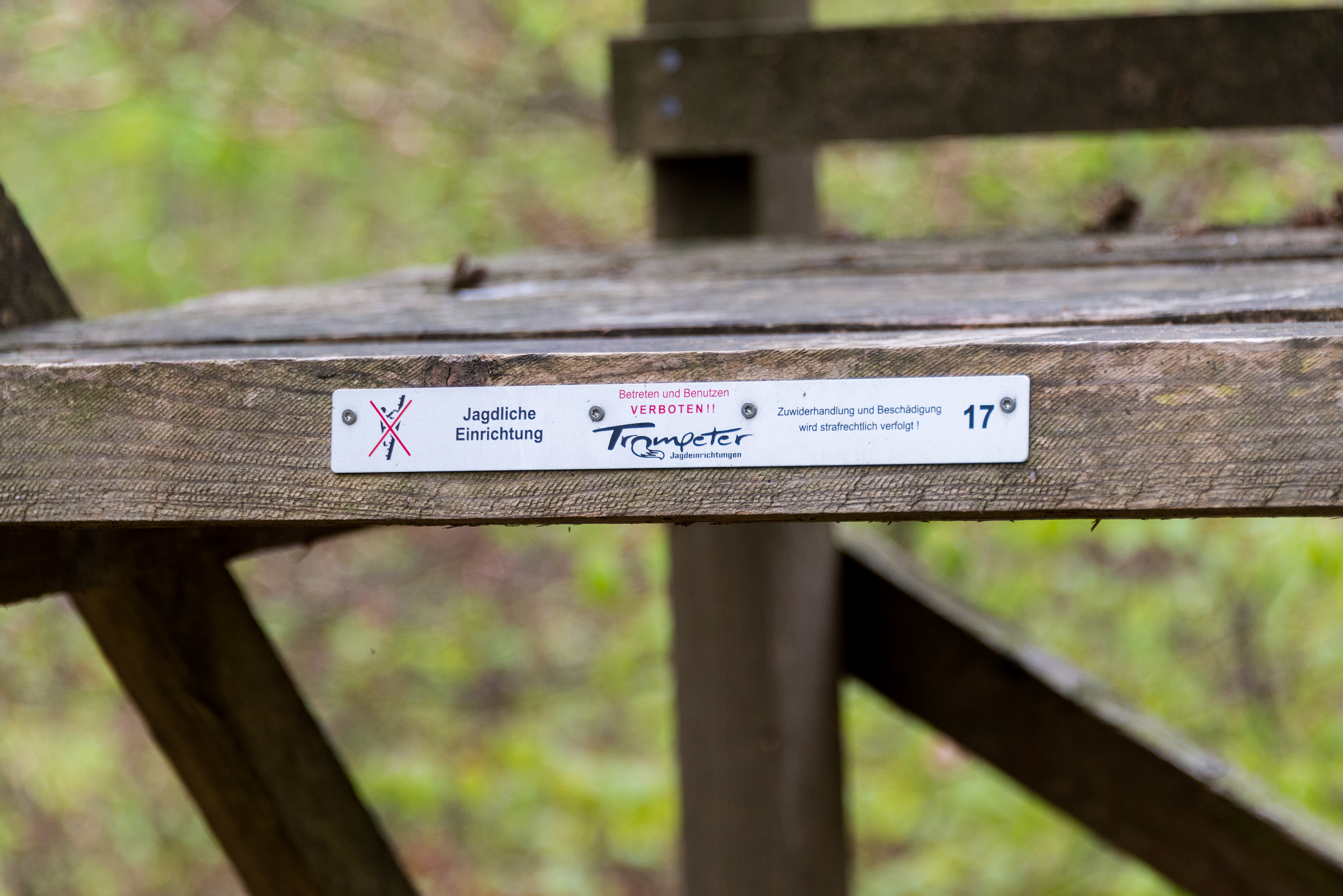 Plaque um "Héich"sëtz am Gehaenebësch zu Senneng.